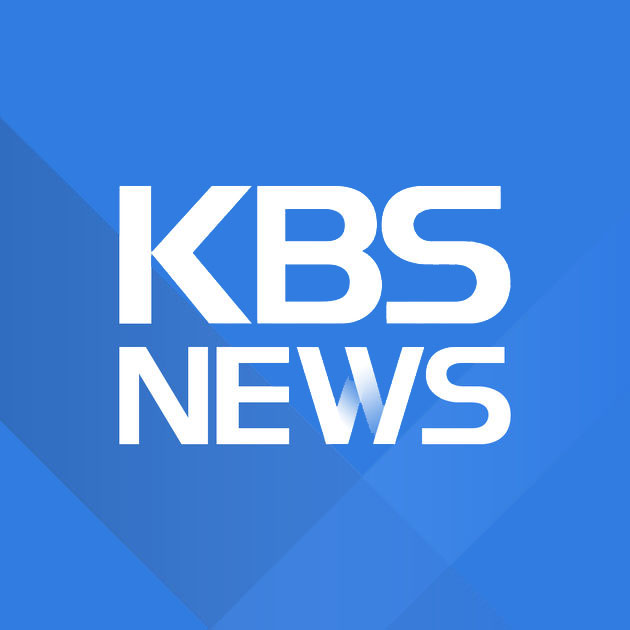 KBS 뉴스 대표 브랜드 로고입니다.